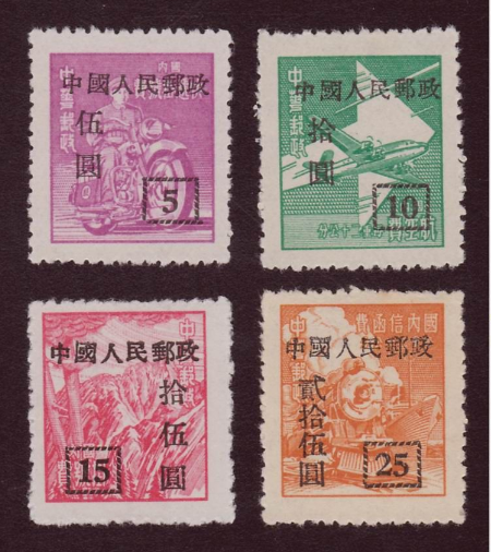 中文（中国大陆）: 中华邮政单位邮票加字改值邮票（改8）